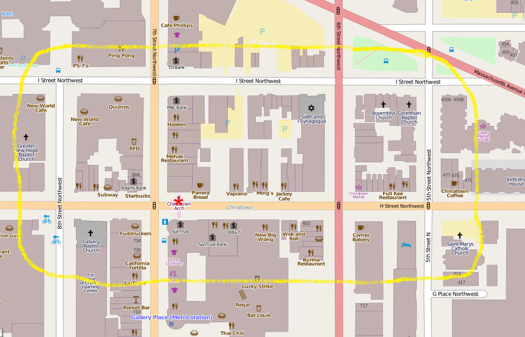 geografische kaart via [1] nieuwe Chinatown van Washington D.C. De rode asterisk geeft de Chinese poort aan.